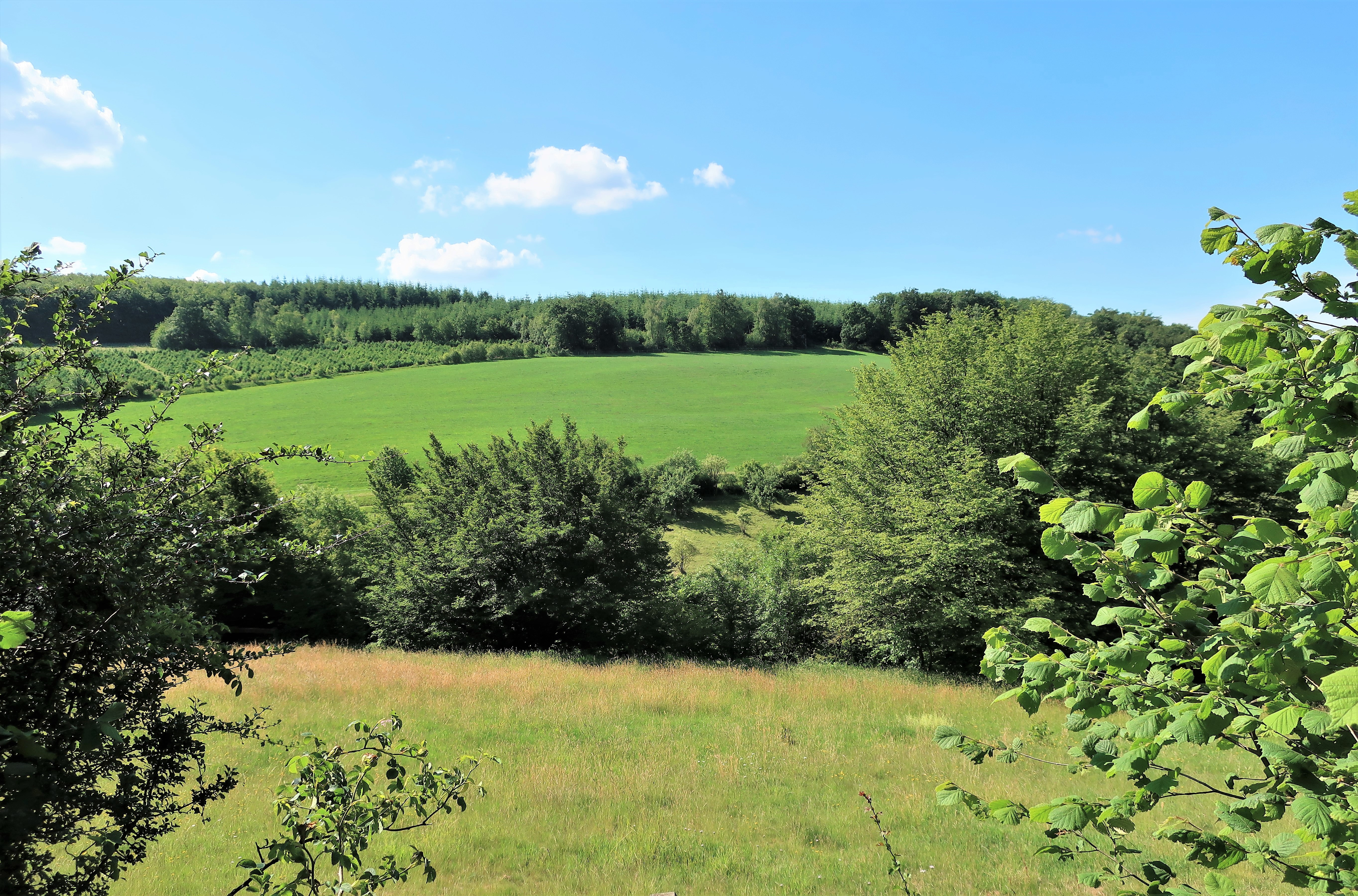 Geschützter Landschaftsbestandteil 1.4.2.87 „Rumscheid“ in Hagen, westlich von Rumscheid. Es handelt sich um eine feuchte Wiese mit randständigen Hecken sowie um ein Kleingewässer.